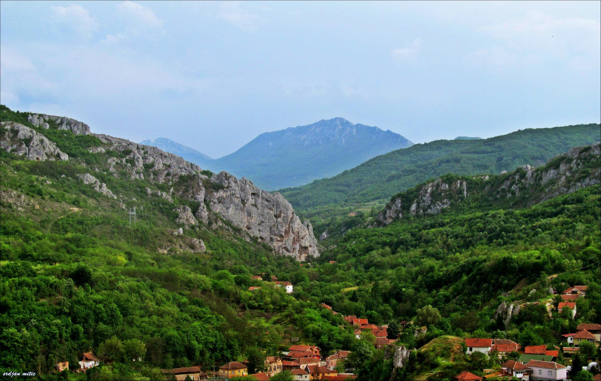 Srpski (latinica): Jelašnička klisura, pogled iz Jelašnice, Niš, Srbia.